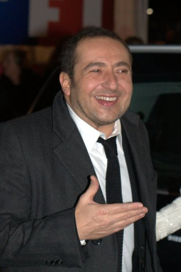 Cannes (Alpes-Maritimes, France) : Patrick Timsit aux NRJ Music Awards.